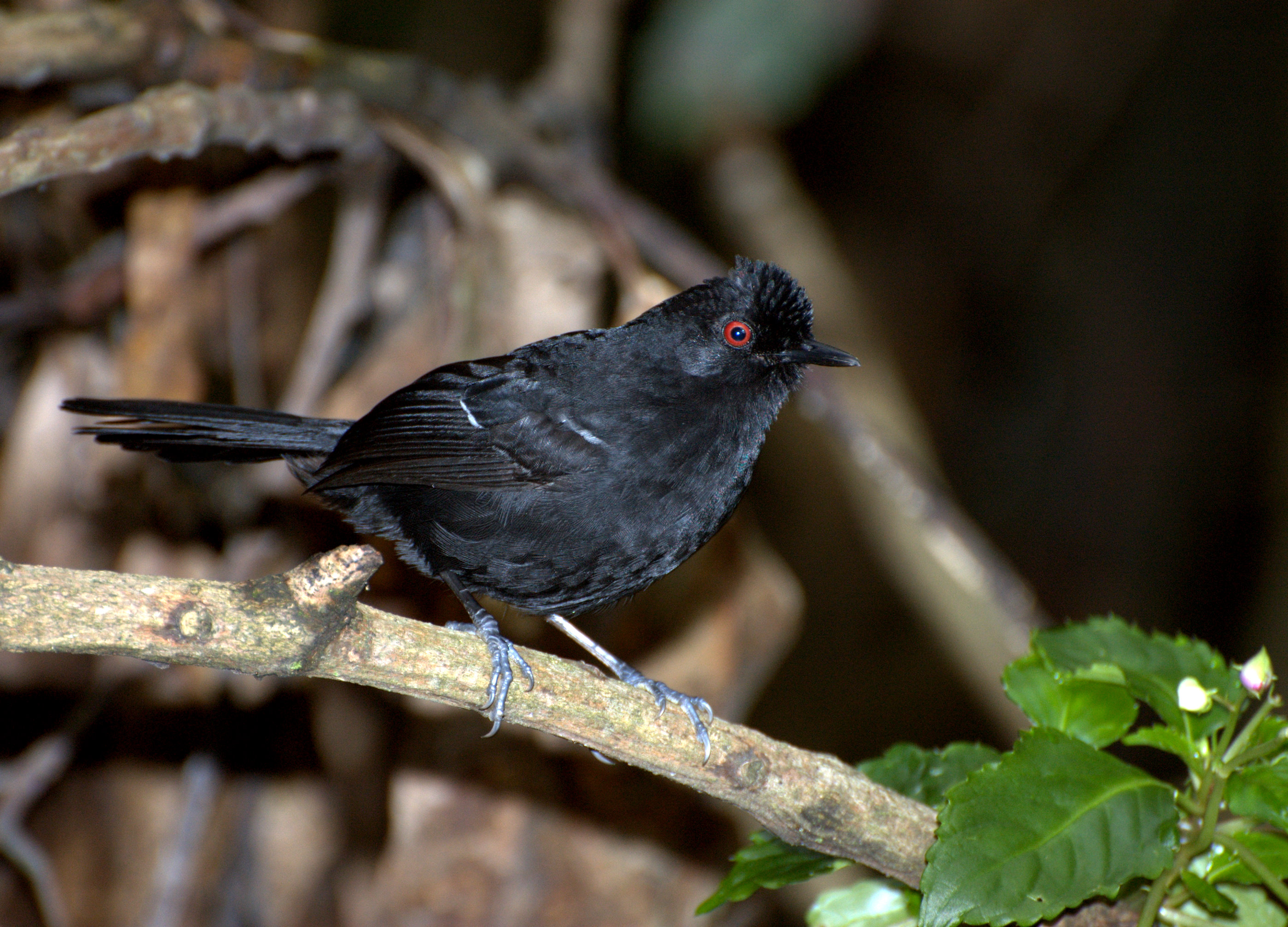 Parque Estadual da Serra da Cantareira - São Paulo - Capital - Brasil